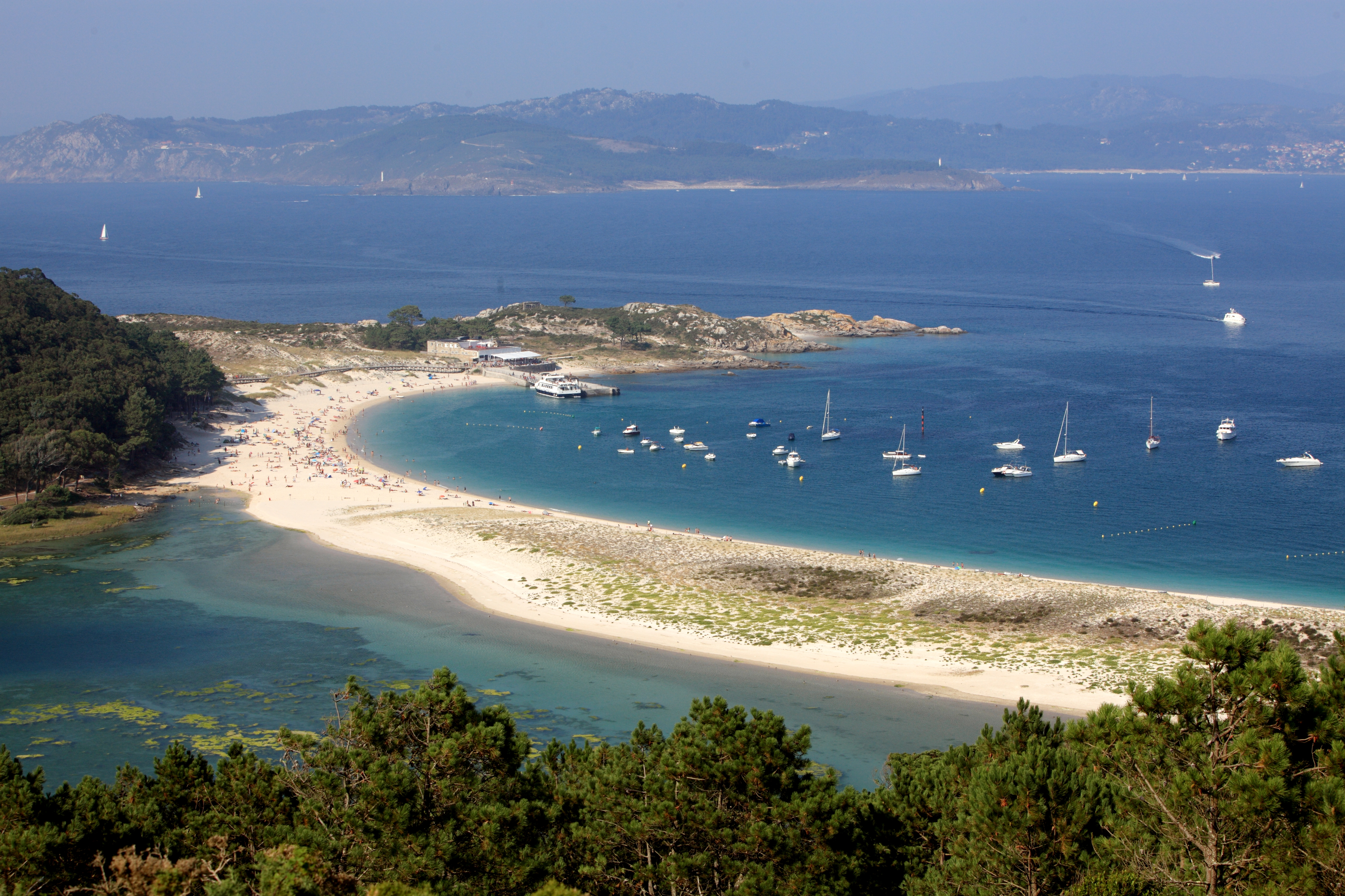 Playa de Rodas de las Islas Cíes This is a photography of a Special Area of Conservation in Spain with the ID: ES0000001. Natura2000 entry, EEA entry